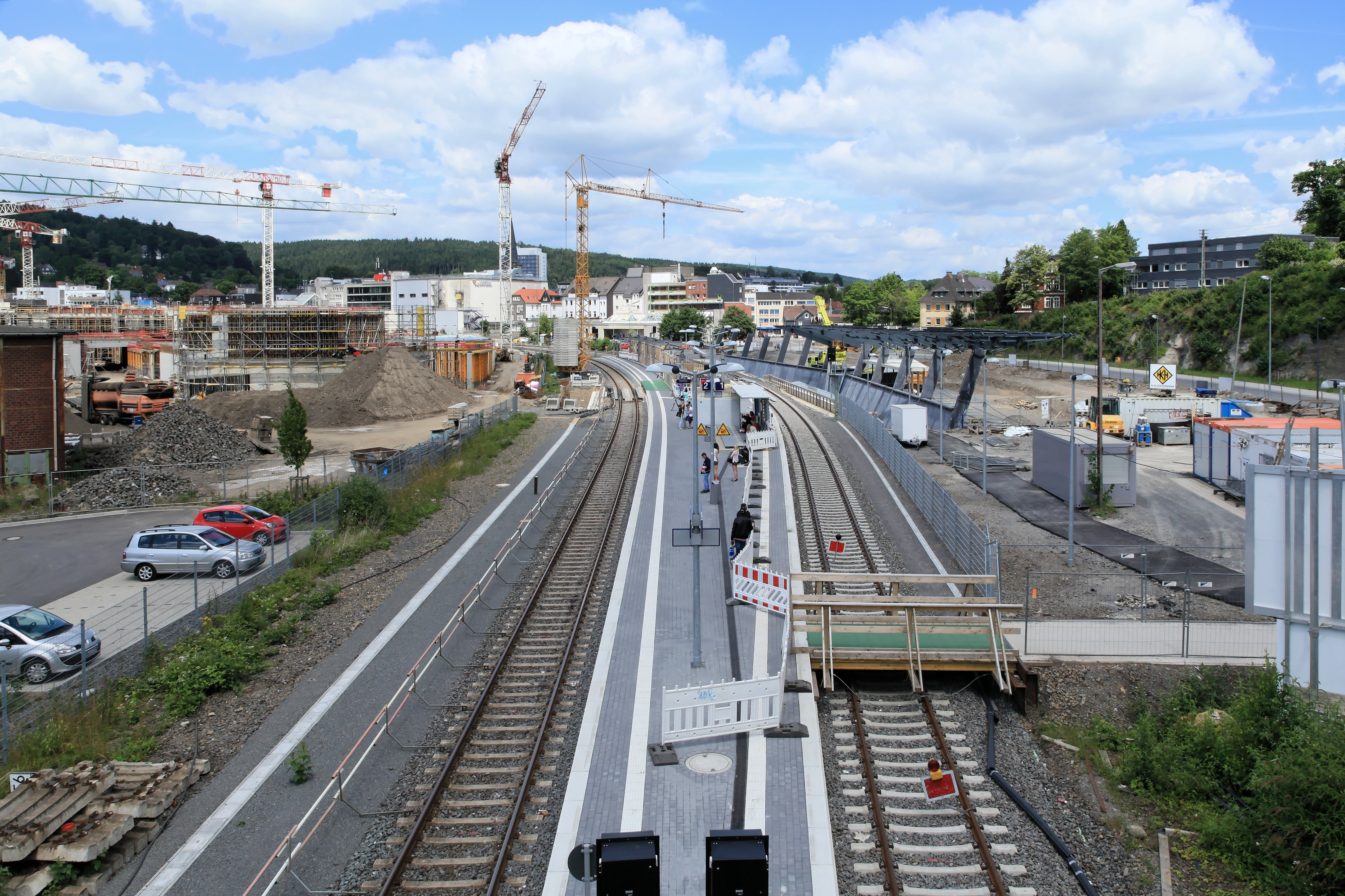 Blick von der Behelfsbrücke auf den Bahnhof Gummersbach während der Bauarbeiten, Bahnhofstraße in Gummersbach